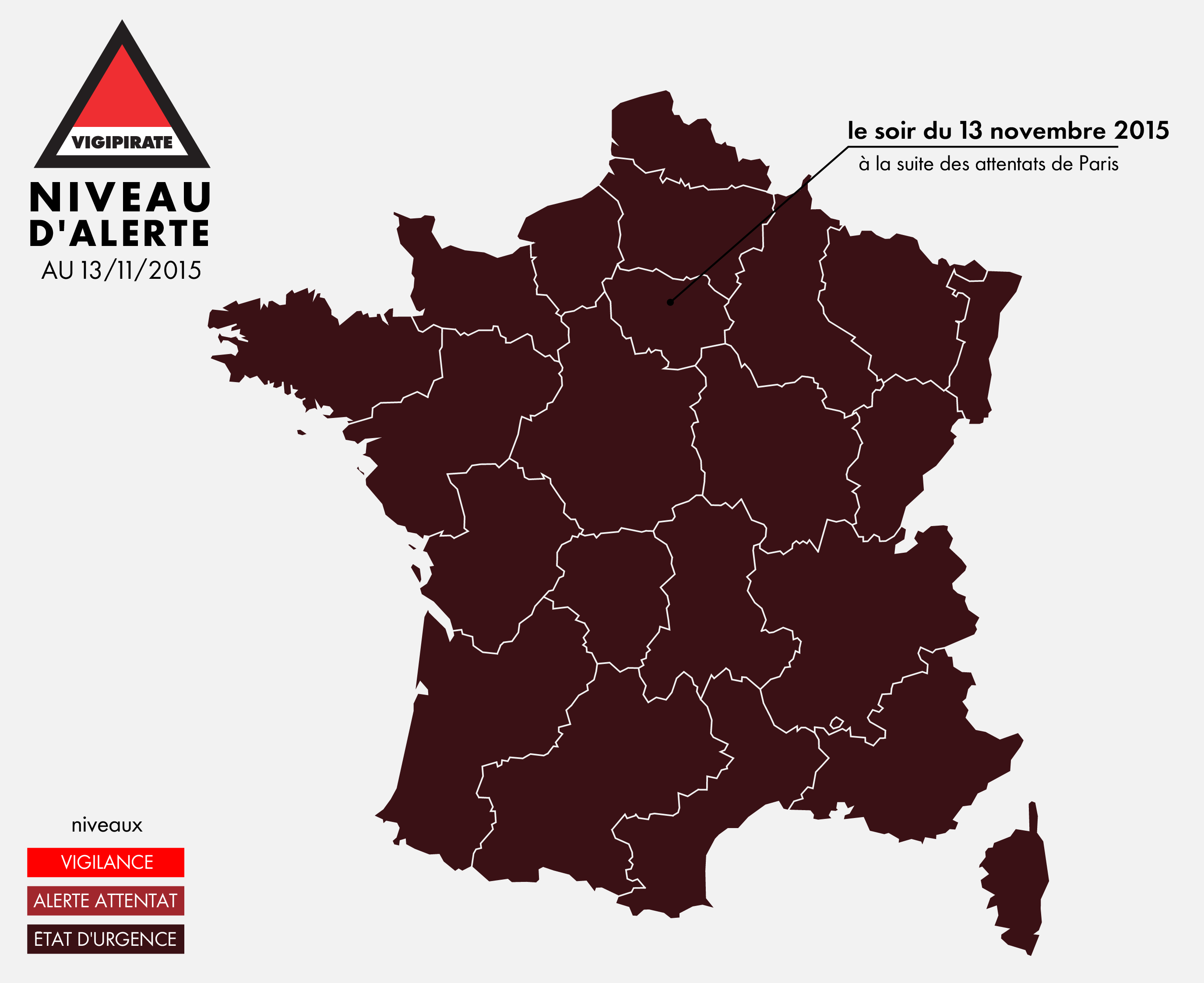 Organisation du plan vigipirate au 13 novembre 2015. La France, est placée sous État d'Urgence à la suite des attentats de Paris du même jour.